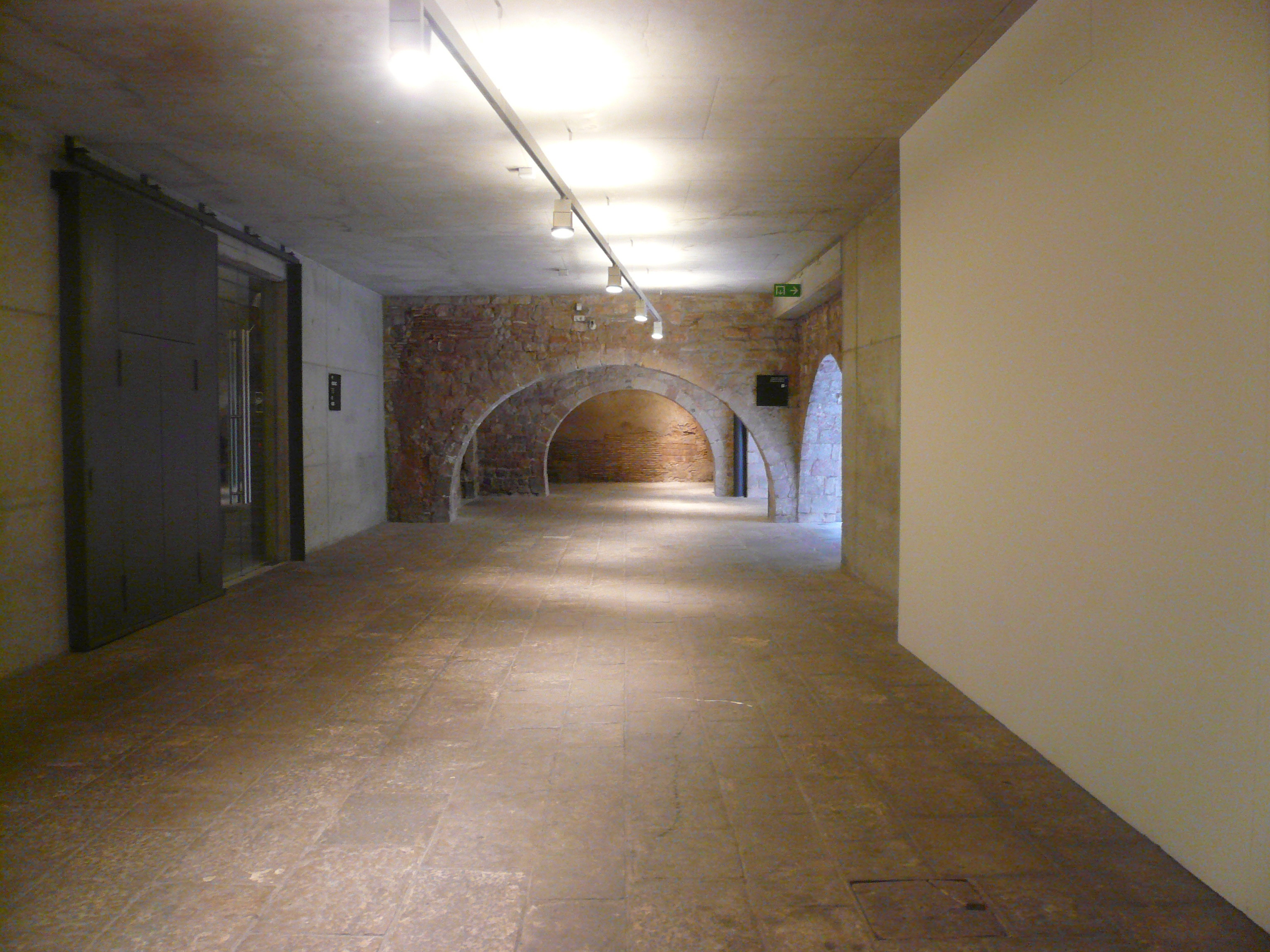 Casa Mauri (Barcelona)